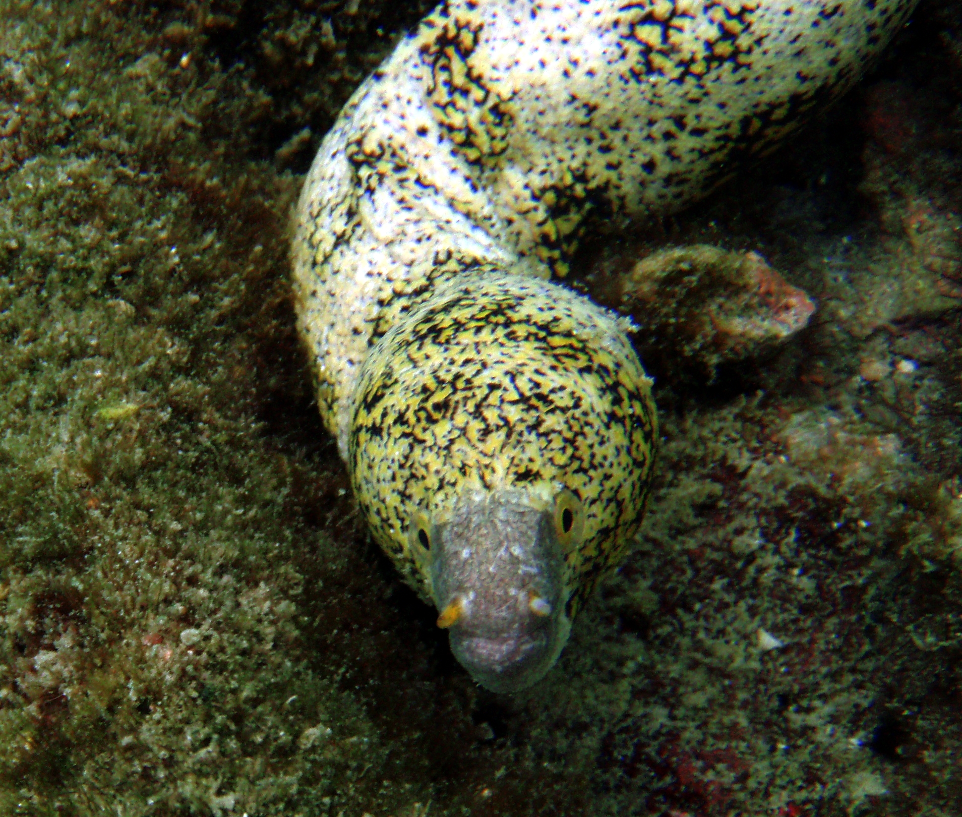 Snowflake moray, Echidna nebulosa in Kona, Big Island of Hawaii